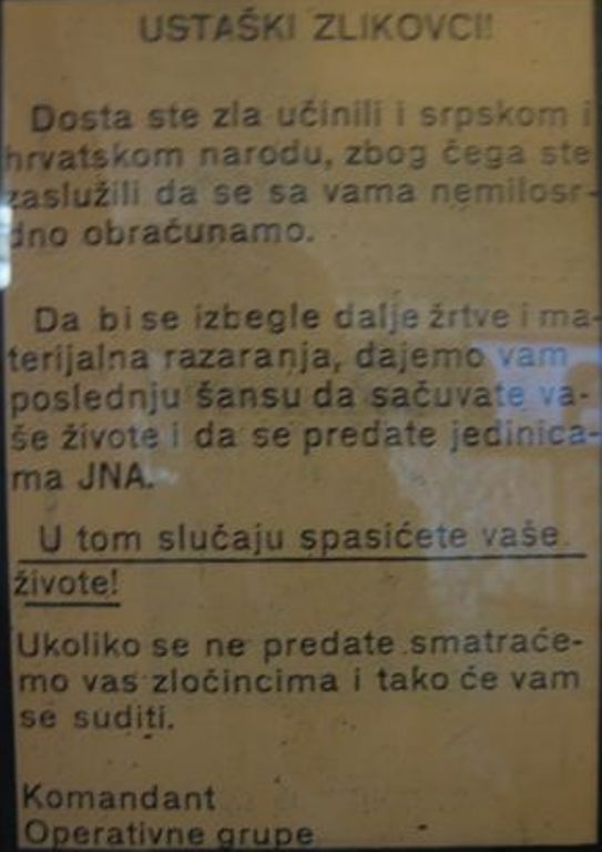 Letak za poziv na predaju